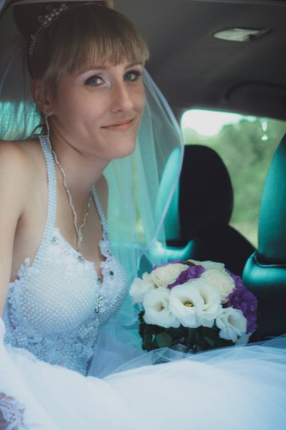 Свадьба